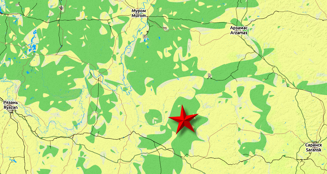 Расположение Дубравлага